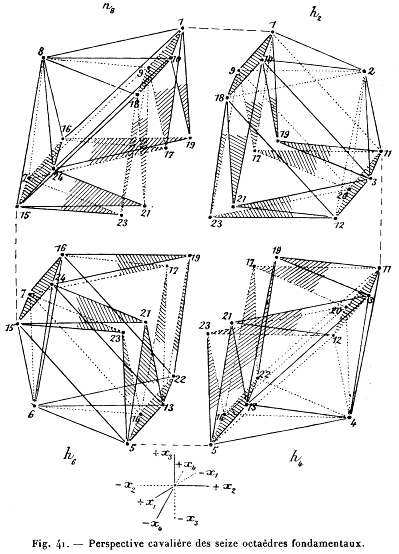 illustration from Traité élémentaire de géométrie à quatre dimensions by Esprit Jouffret (page 153)